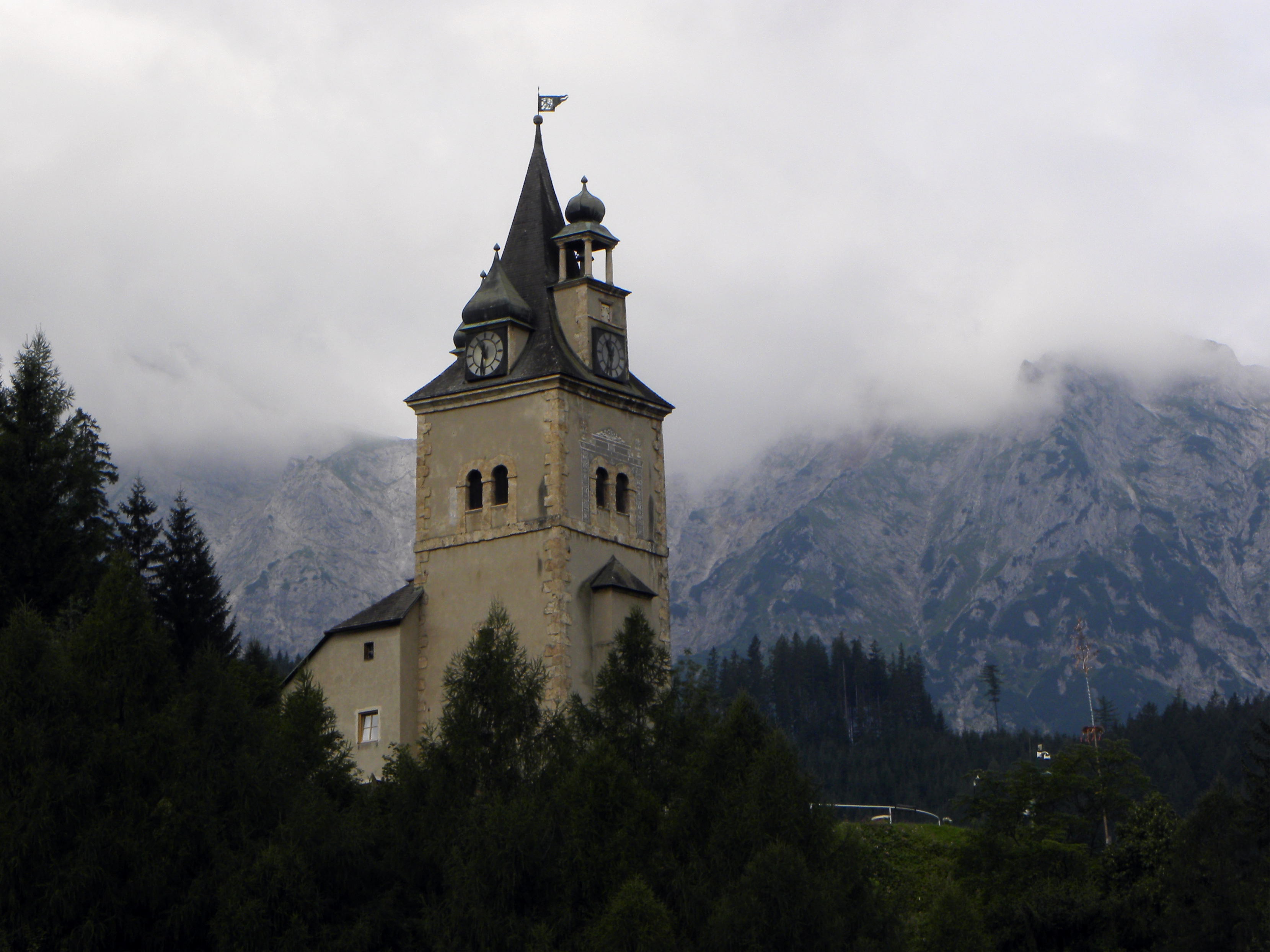 Schichtturm vom Wiesenweg zur Kirche aus aufgenommen